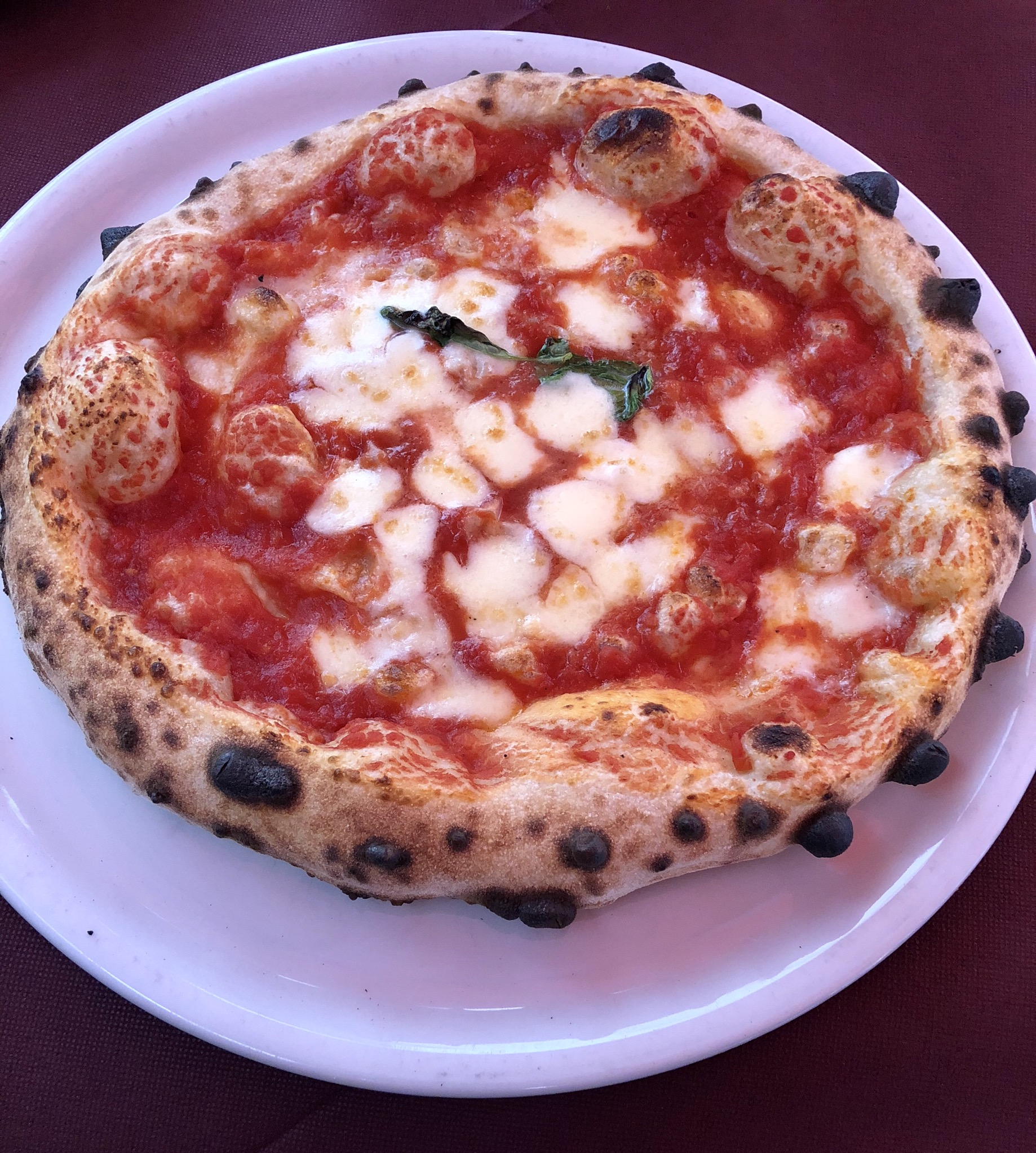 Pizza margherita tradizionale napoletana